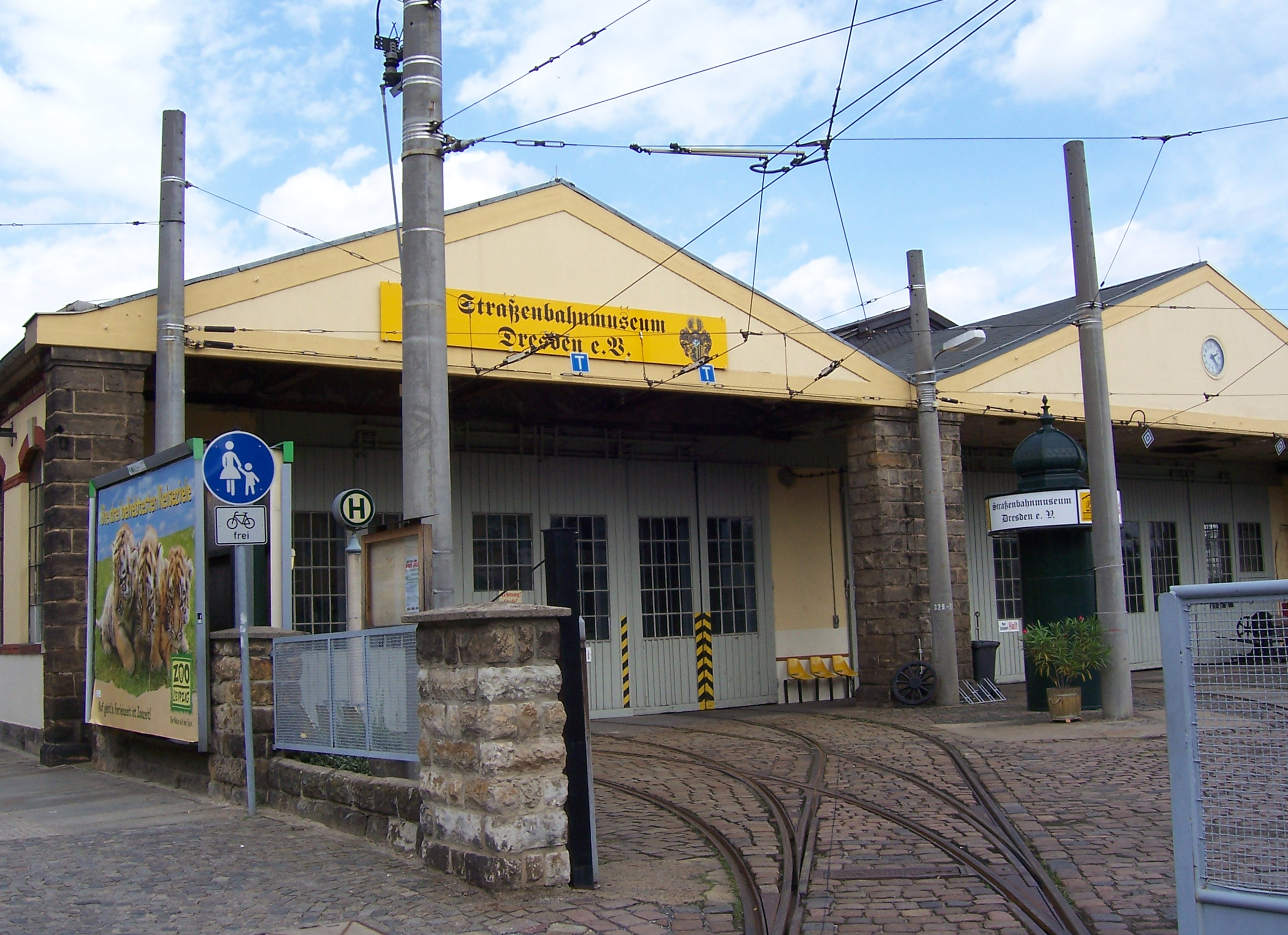 Straßenbahnmuseum Dresden im Betriebshof Tracheberge